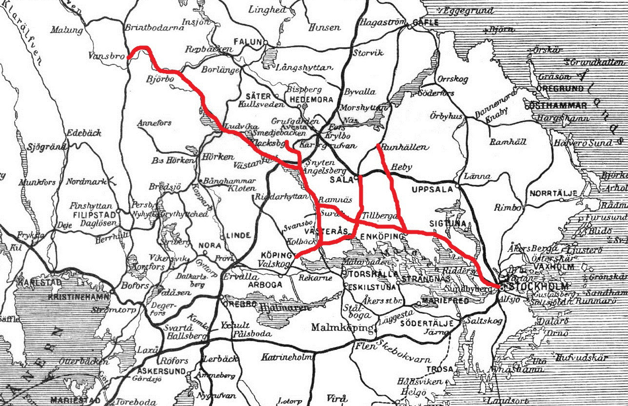 Stockholm–Västerås–Bergslagens Järnvägars sträcknät fullt utbyggd